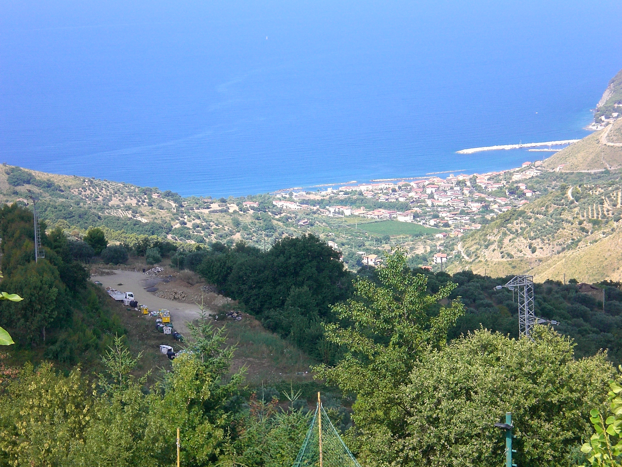 View Agnone Cilento from Serramezzana